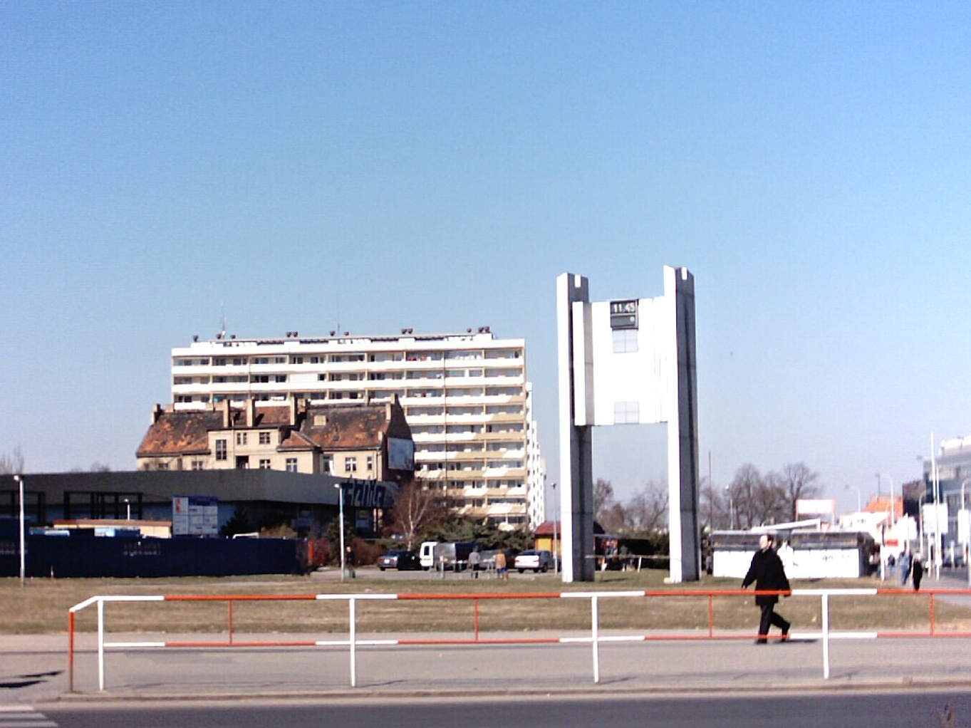 Praha Pankrác - Pankrácká tržnice v roce 2003